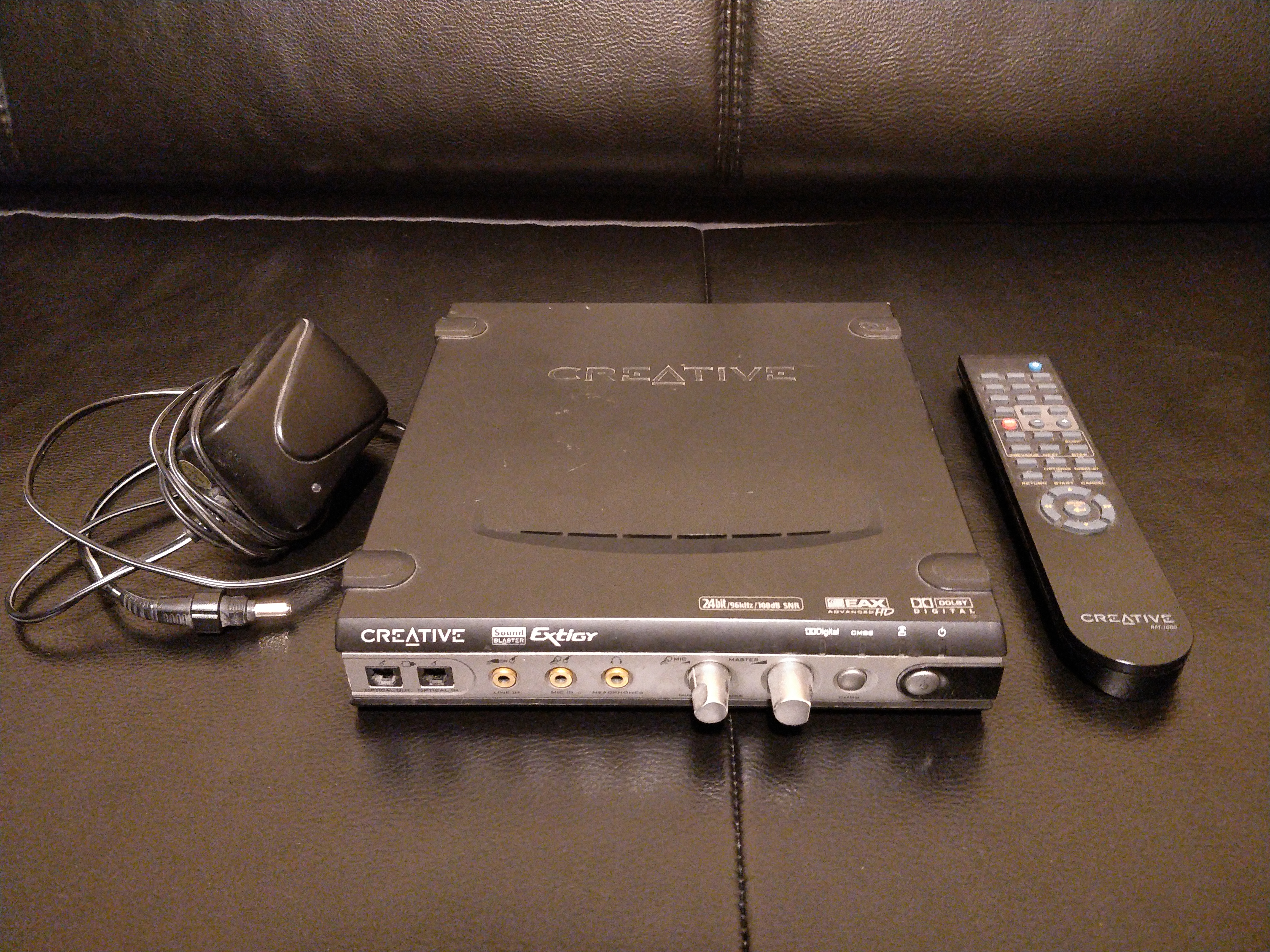 Sound Blaster Extigy